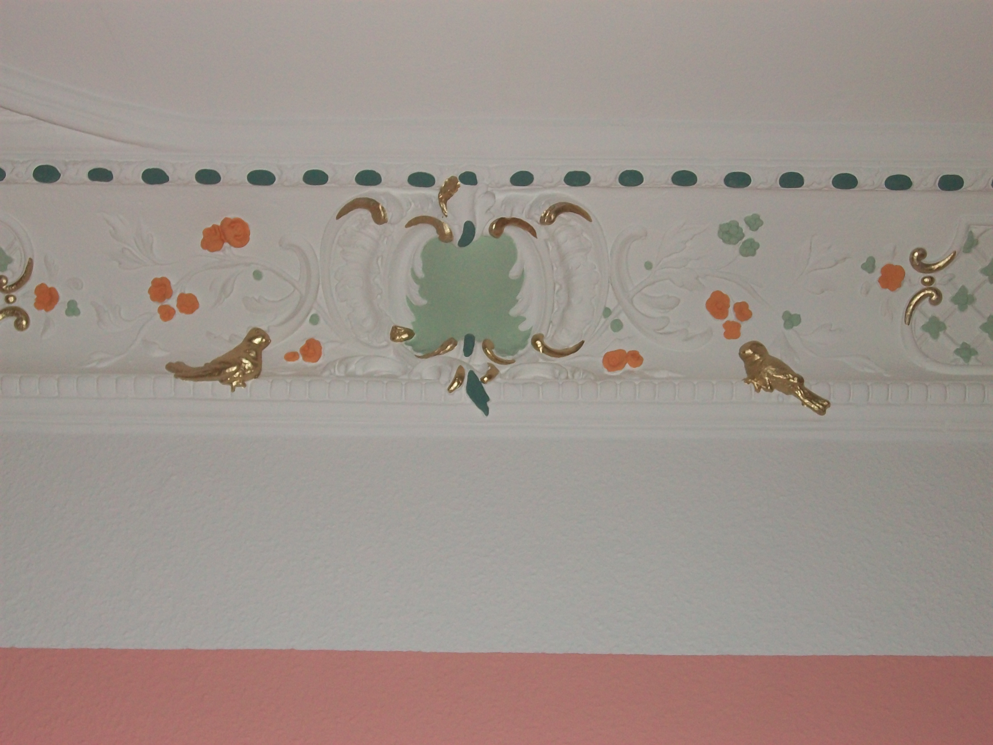 restaurierter Innenstuck - nach aufwändiger Reinigung zeigte sich die verblasste Originalbemalung, die anschließend wieder nachgearbeitet wurde